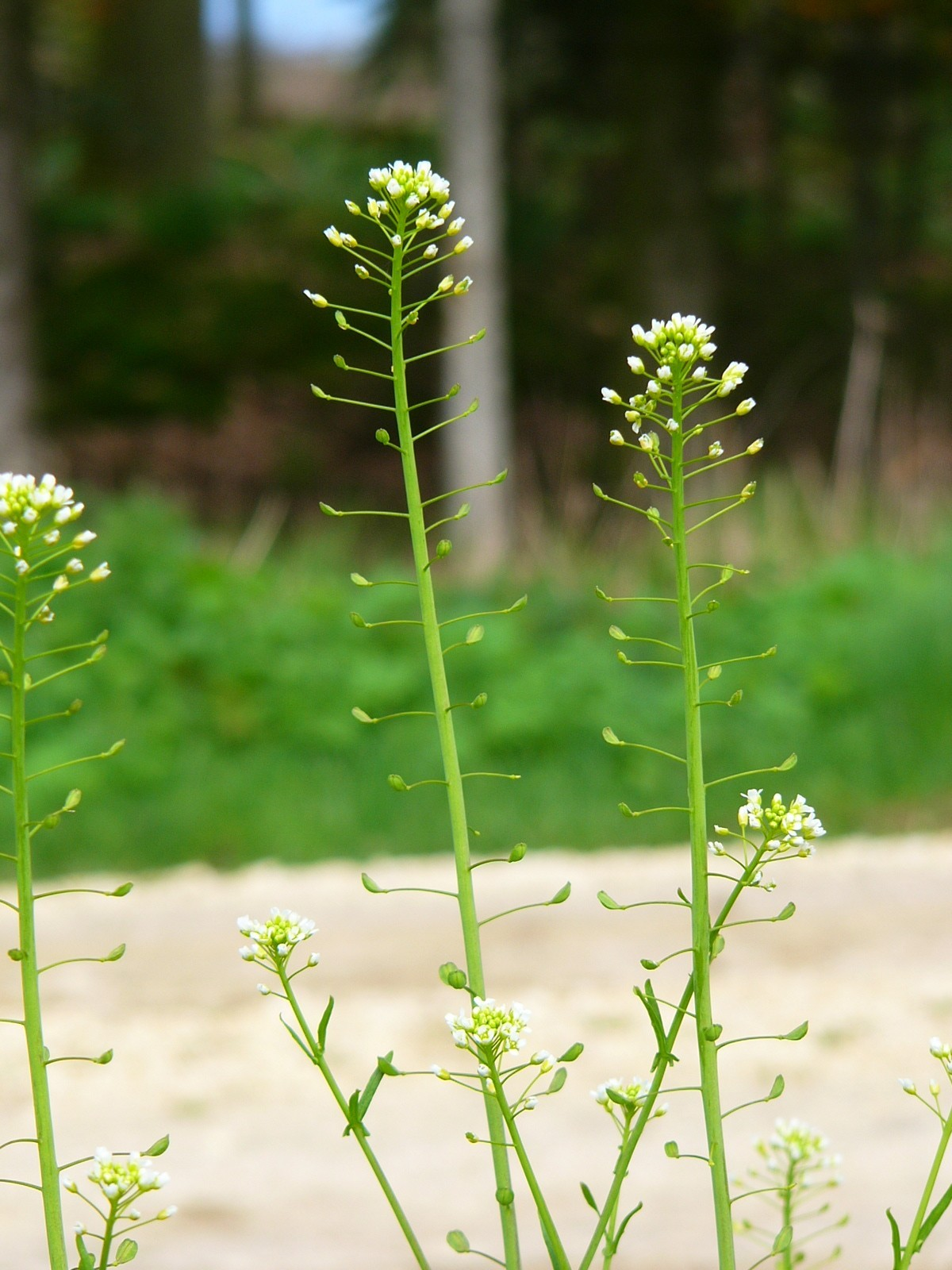 Lauch Hellerkraut